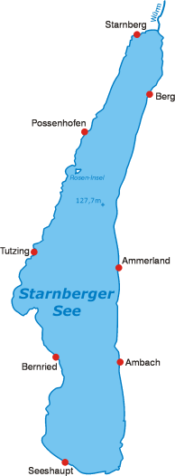 Der Starnberger See mit (einigen) anliegenden Ortschaften